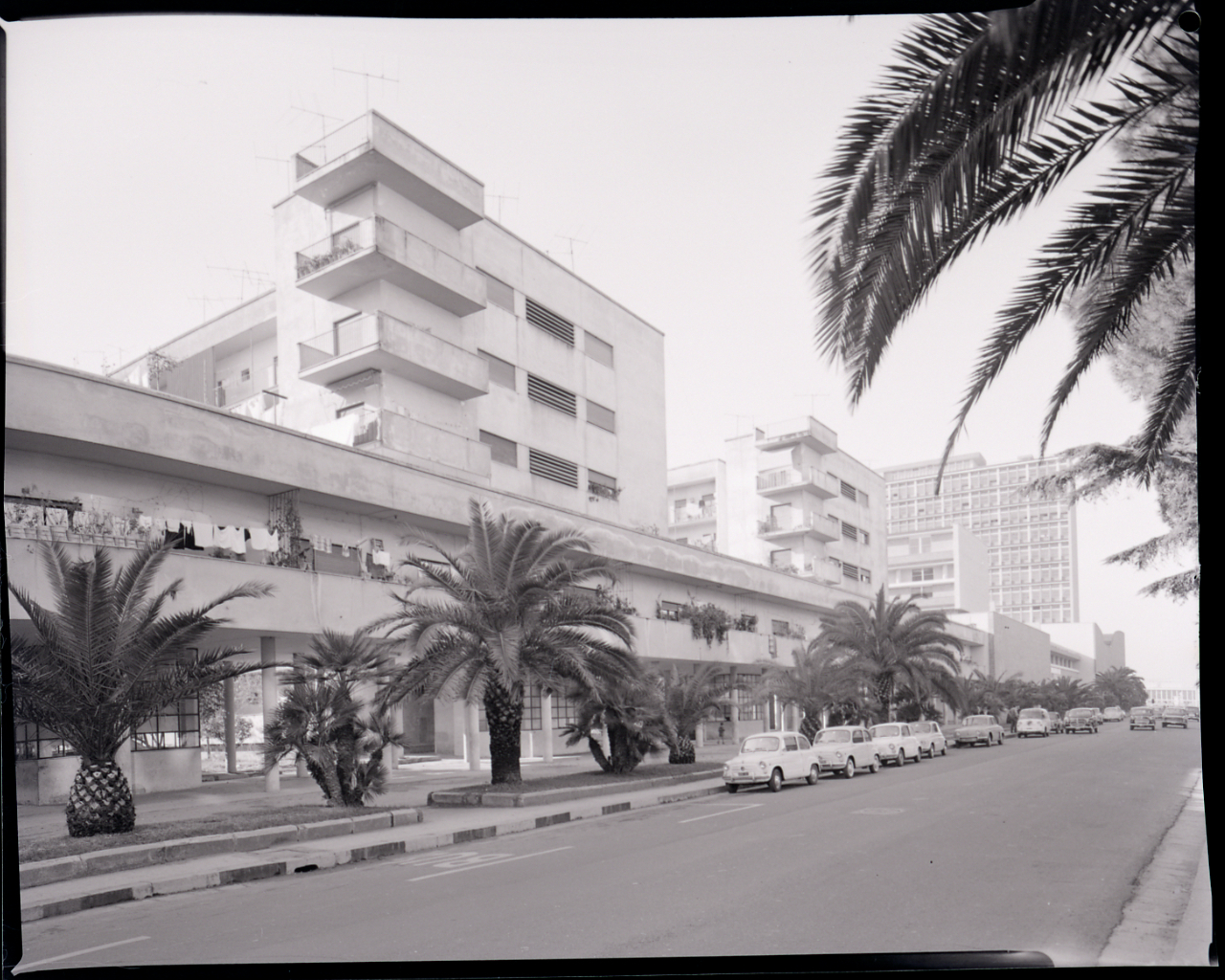 Alloggi per senza tetto di Luigi Cosenza, viale Augusto. Servizio fotografico : Napoli, 1965 / Paolo Monti. - Buste: 25, Fototipi: 26 : Negativo b/n, gelatina bromuro d'argento/ pellicola ; 10x12. - ((Serie costituita da 25 negativi identificati con i nn.: 11932-11956. La suddetta serie è contenuta nella scatola identificata con la numerazione G11501-12000. - Fonte: Agenda di Paolo Monti: Monti/ 2/ 6 giugno 1964 - 31 marzo 1966/ 8194-12420 (1964-1966), presso Archivio Paolo Monti